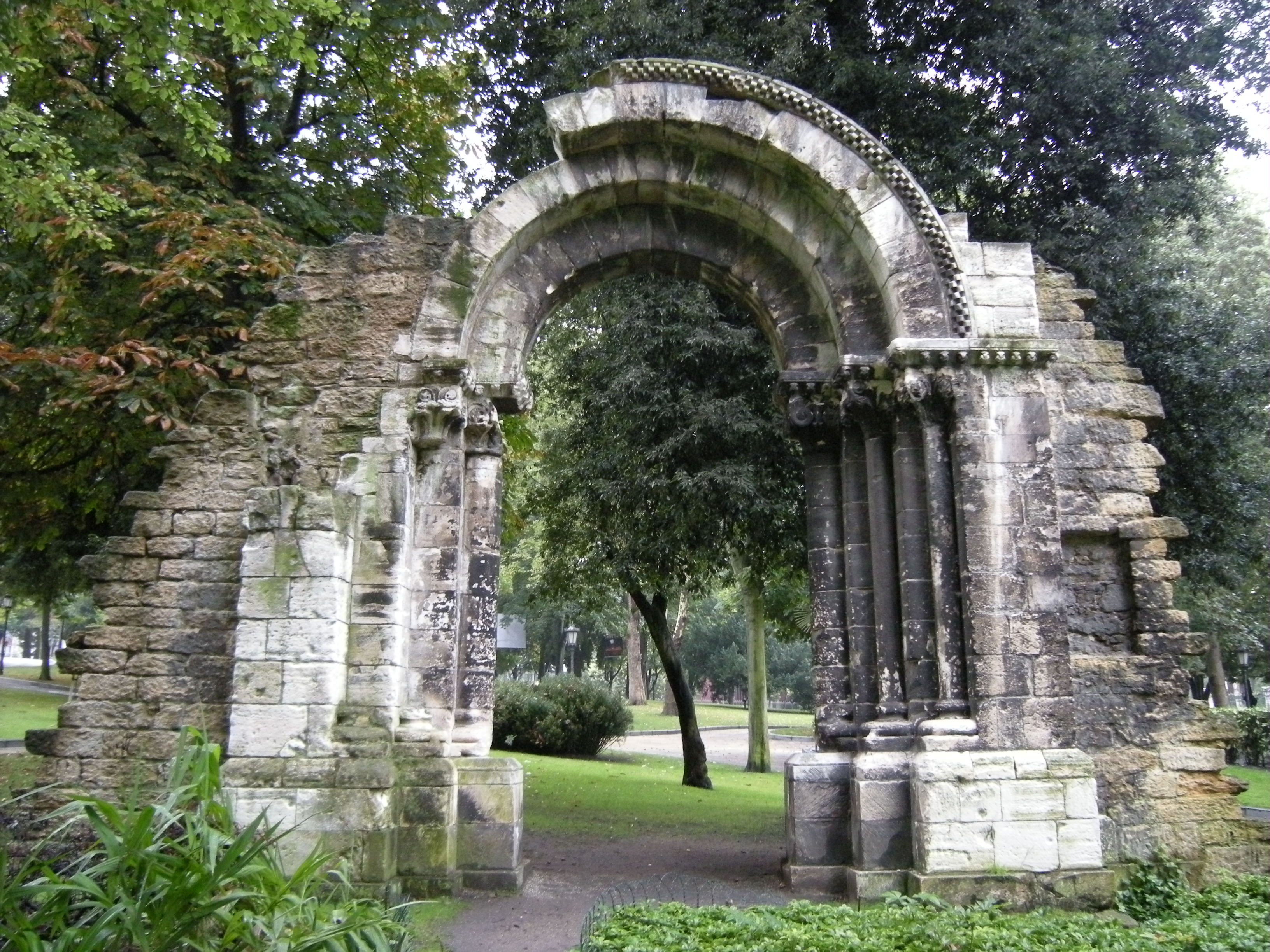 Esta foto participó en el juego En otro lugar de Flickr.